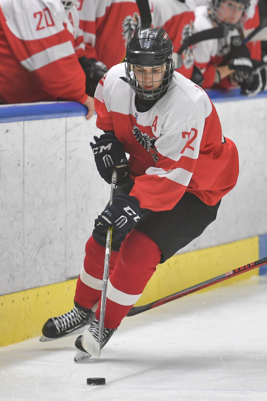 IIHF Eishockey Damen Weltmeisterschaft Division IA am 16. April 2017 in Graz.Bild zeigt Denise ALTMANN (AUT).